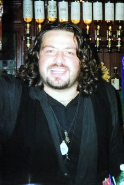 Fotografia di Stefano "Cisco" Bellotti